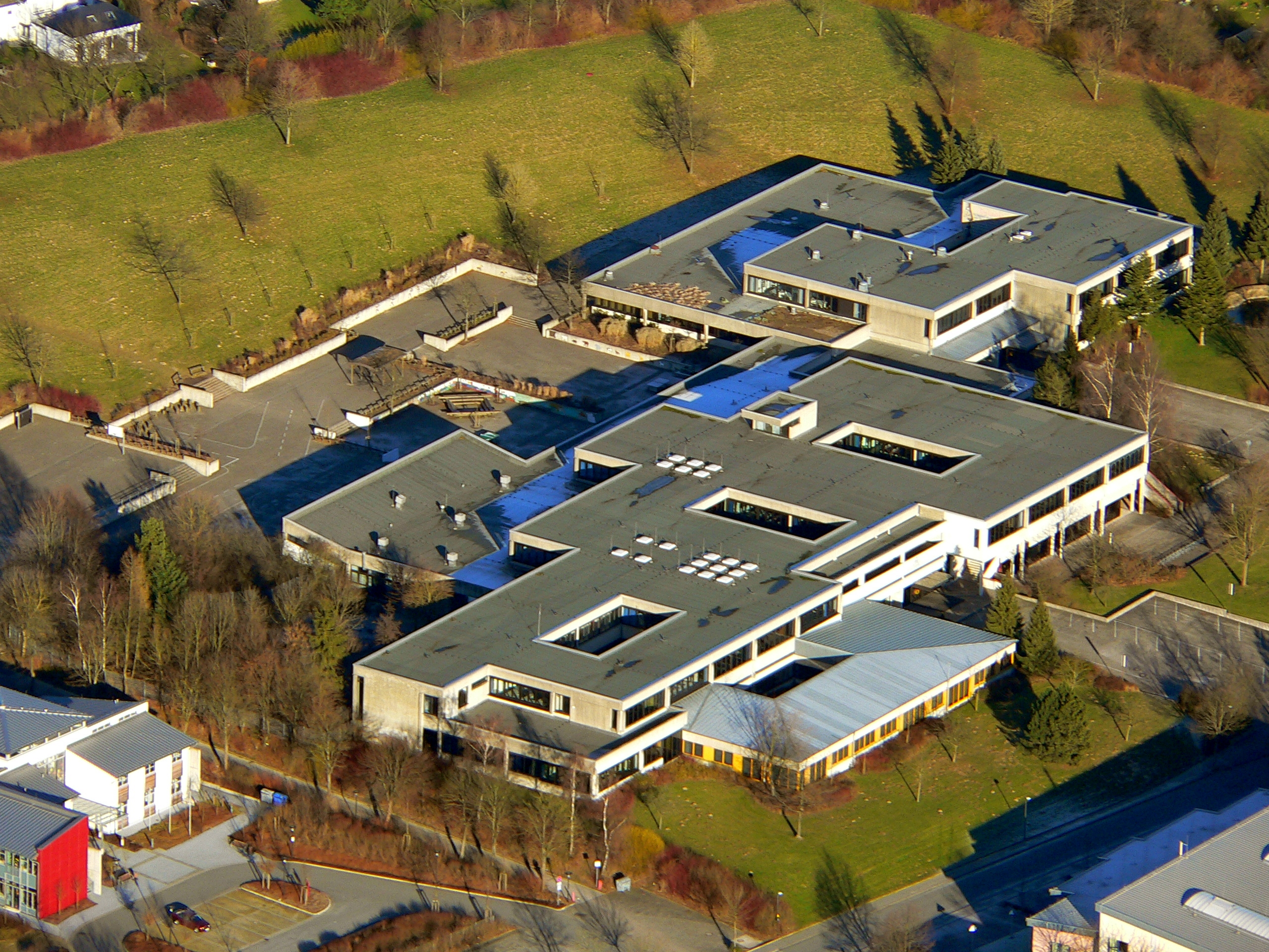 Gymnasium Petrinum, Brilon